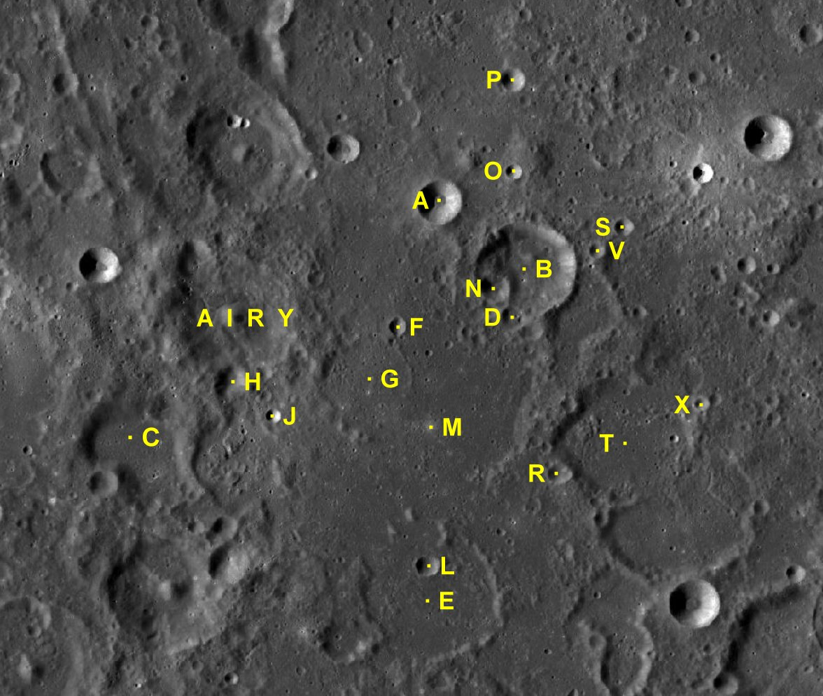 Cráter lunar Airy. Cráteres satélite. (Imagen LRO)